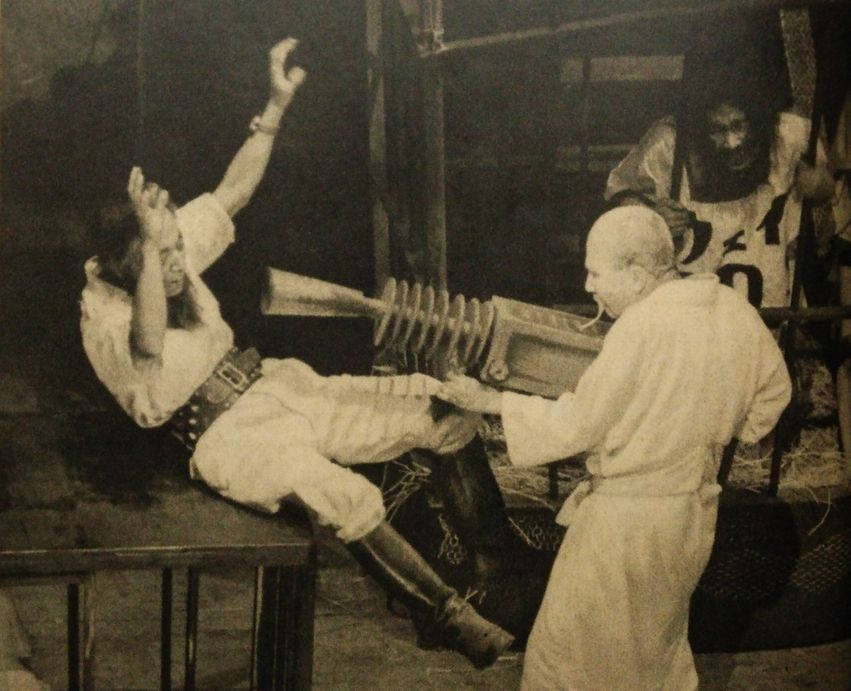 劇団俳優座による、安部公房原作『どれい狩り』公演。右側手前は「閣下」を演ずる浜田寅彦。